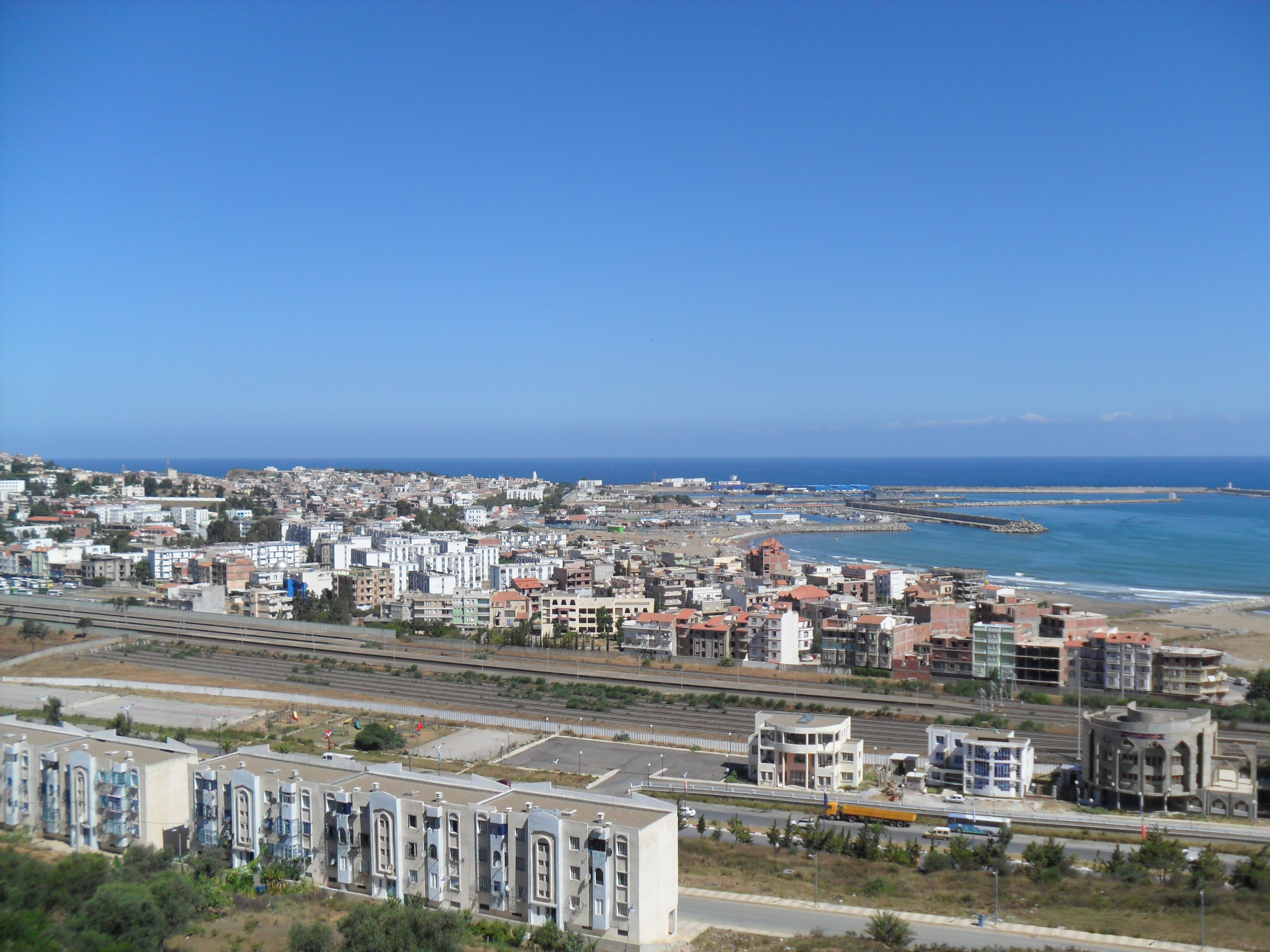 Vue Générale sur la Ville de Jijel (Algérie)